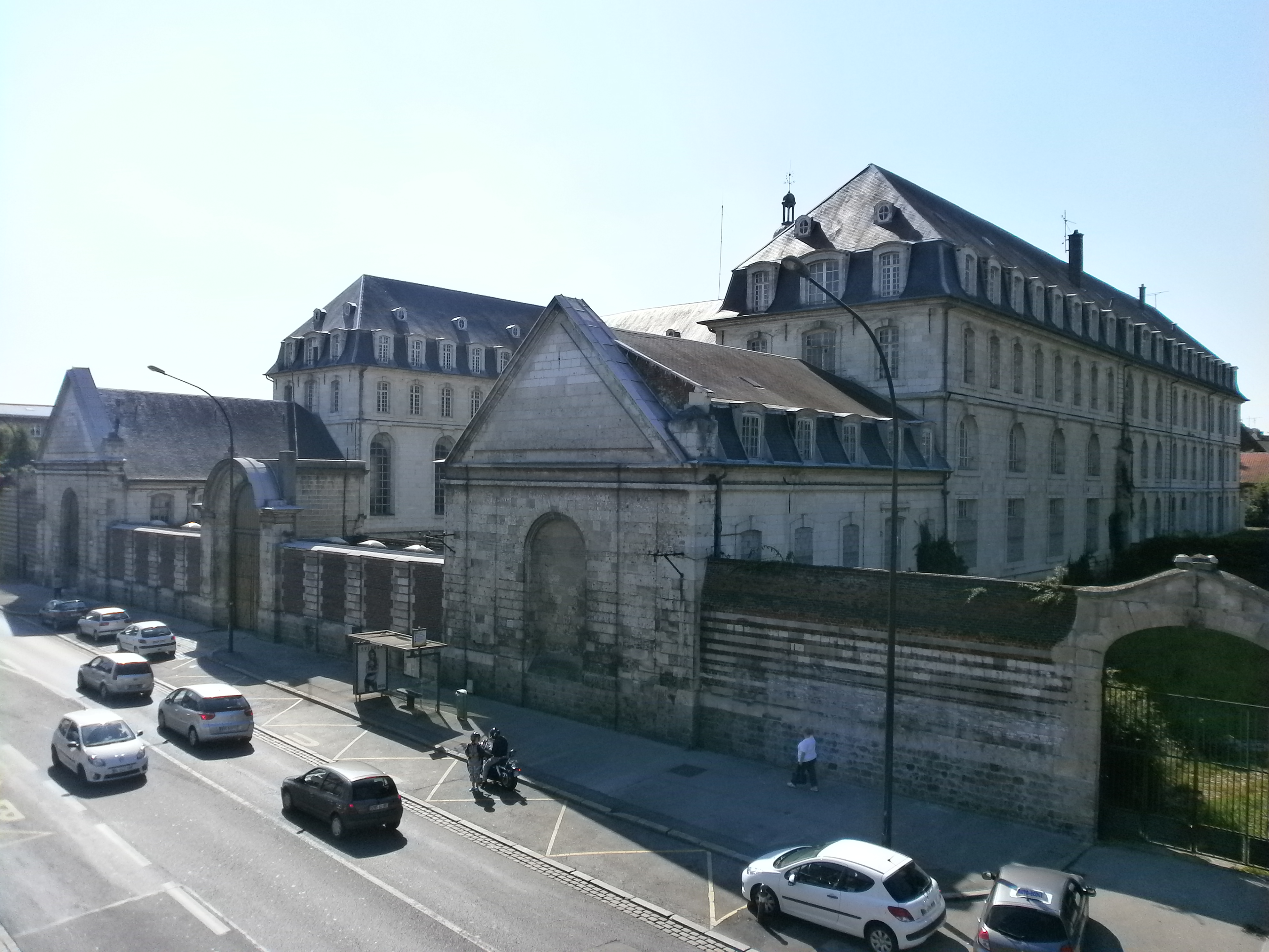 Ancien grand séminaire d'Amiens .